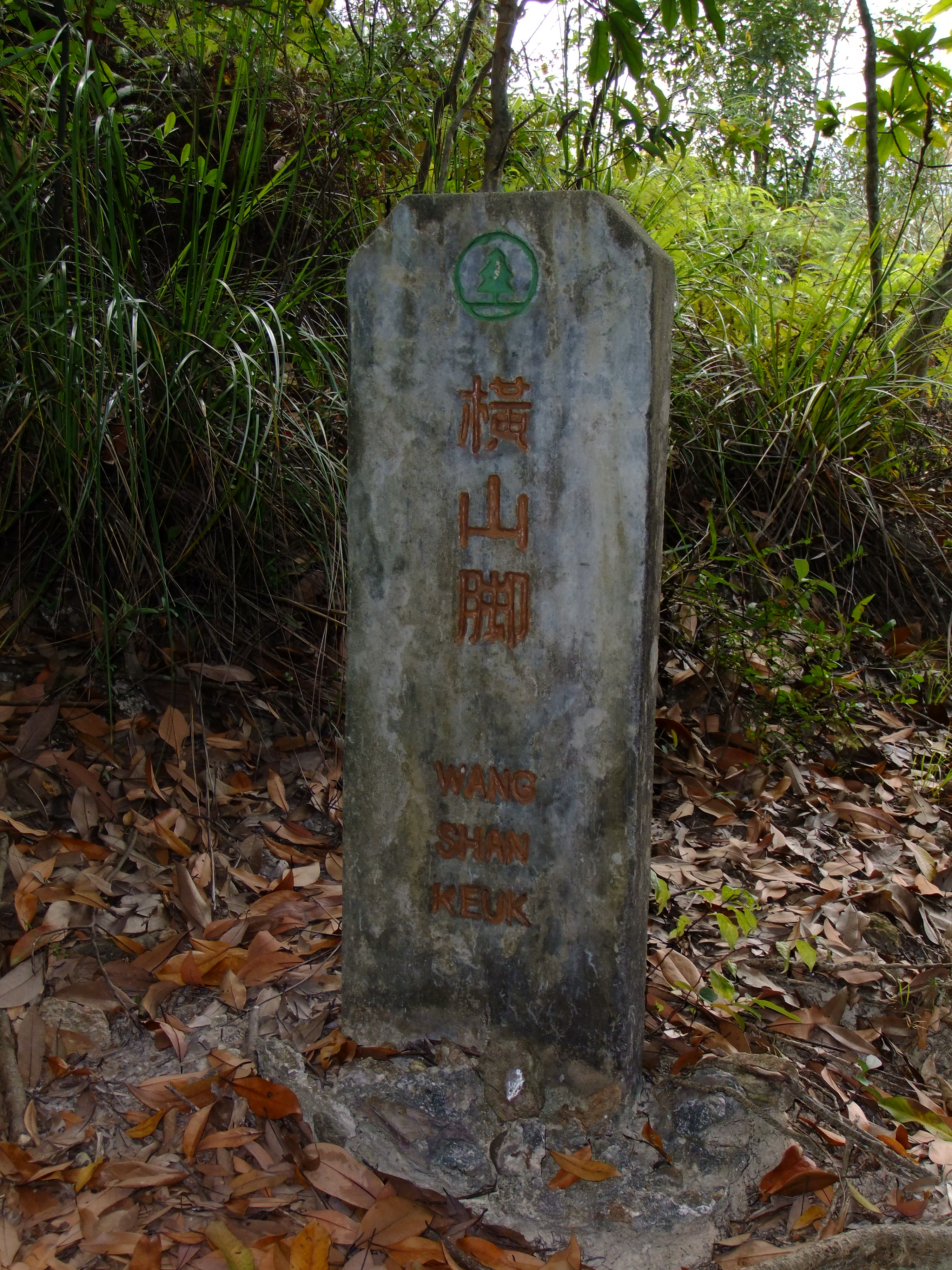 中文（香港）: 香港衞奕信徑橫山腳路標